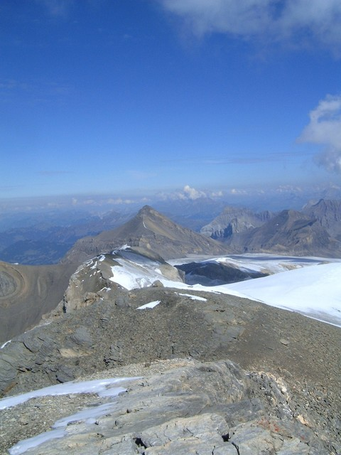 Blick vom Sommet des Diablerets nach Nordosten zum Oldenhorn.